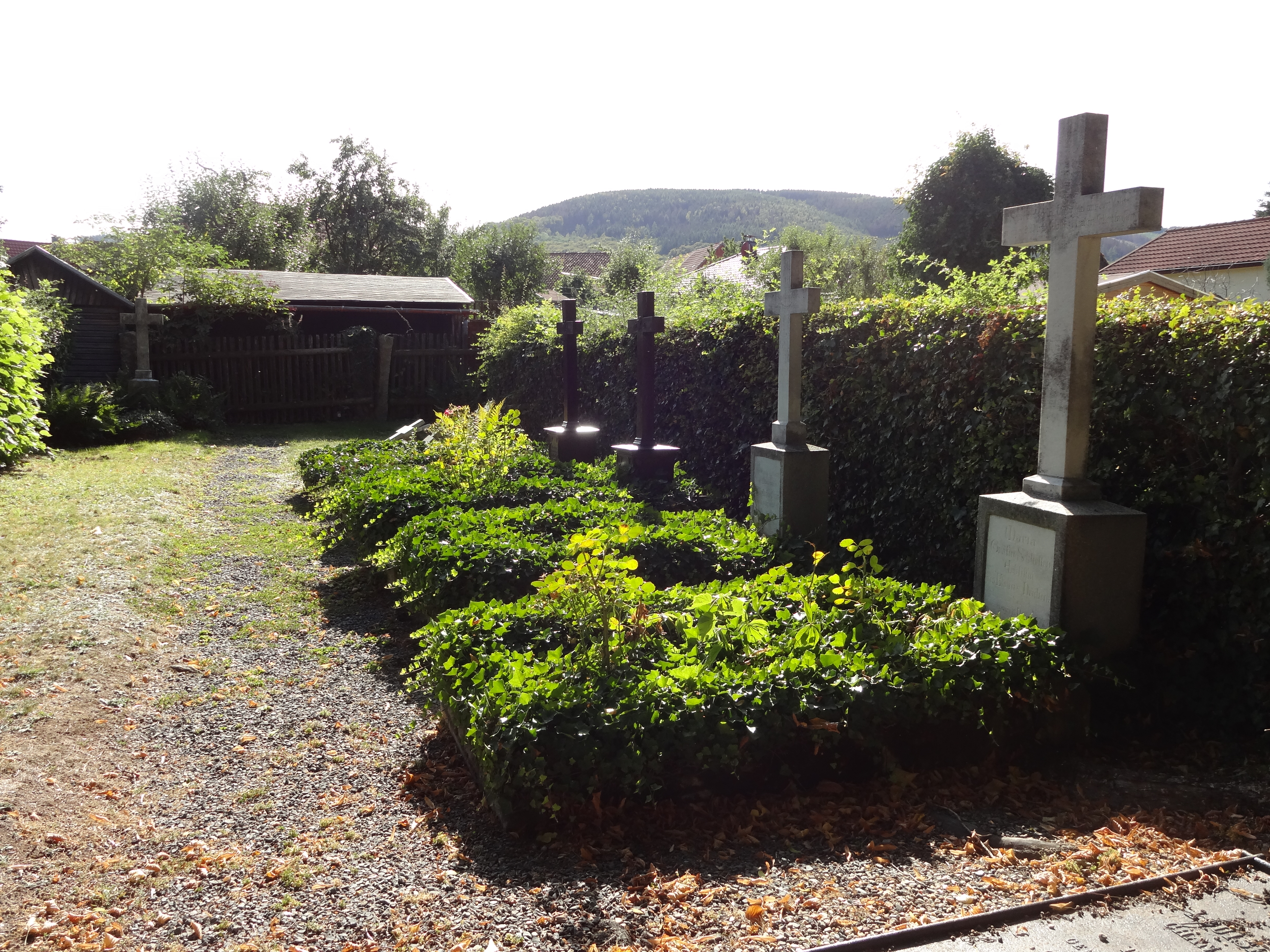 denkmalgeschützte Historische Grabmale des Kloster Drübeck auf dem Friedhof Drübeck